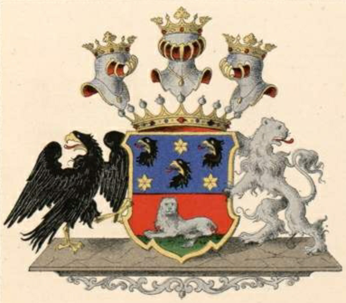 Kelleri suguvõsa krahvivapp